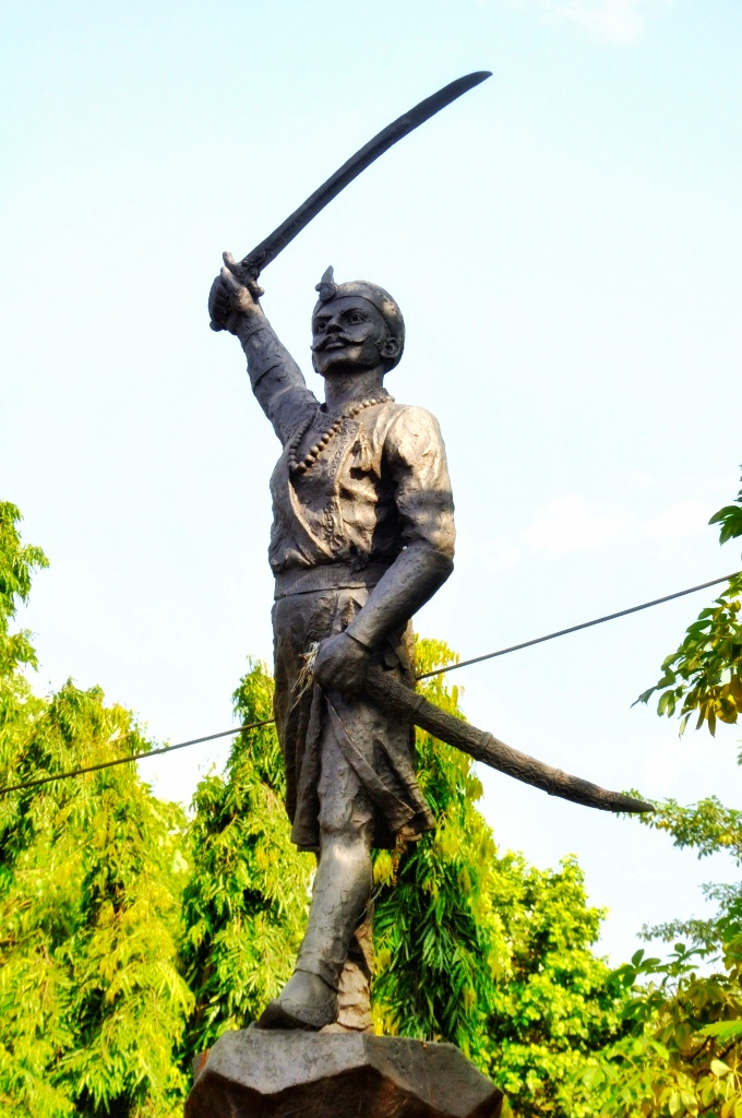 తాంతియా తోపే